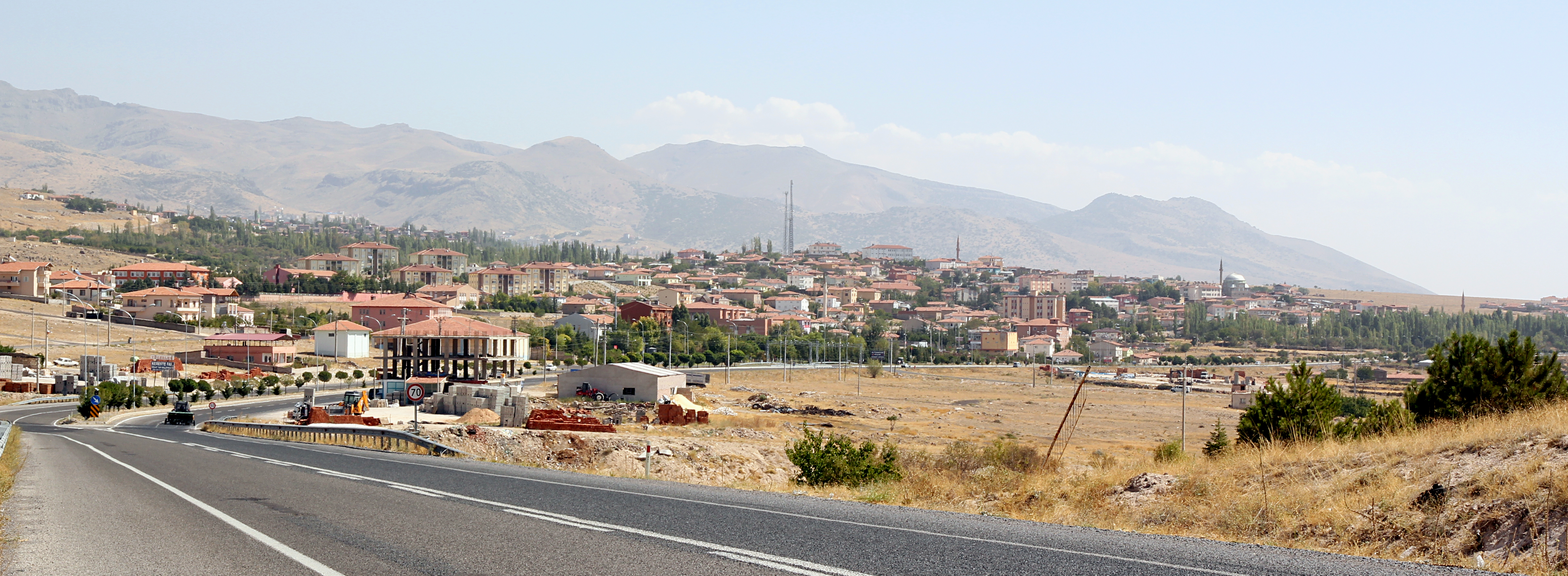 Altunhisar, Kreisstadt in der südtürkischen Provinz Niğde